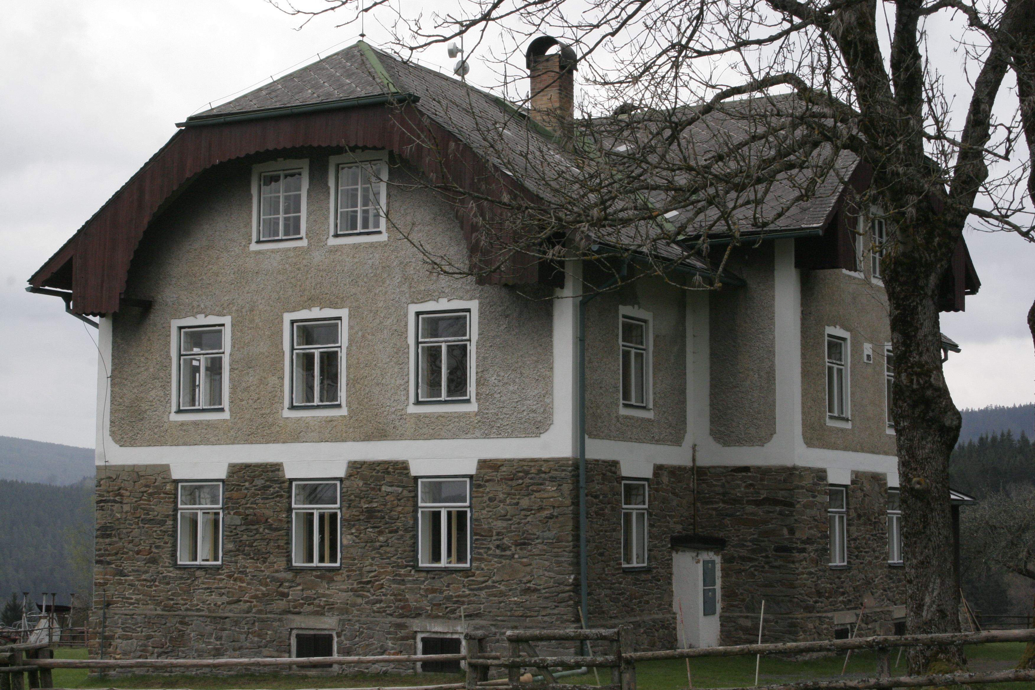 Šukačka. Okres Klatovy, Česká republika.